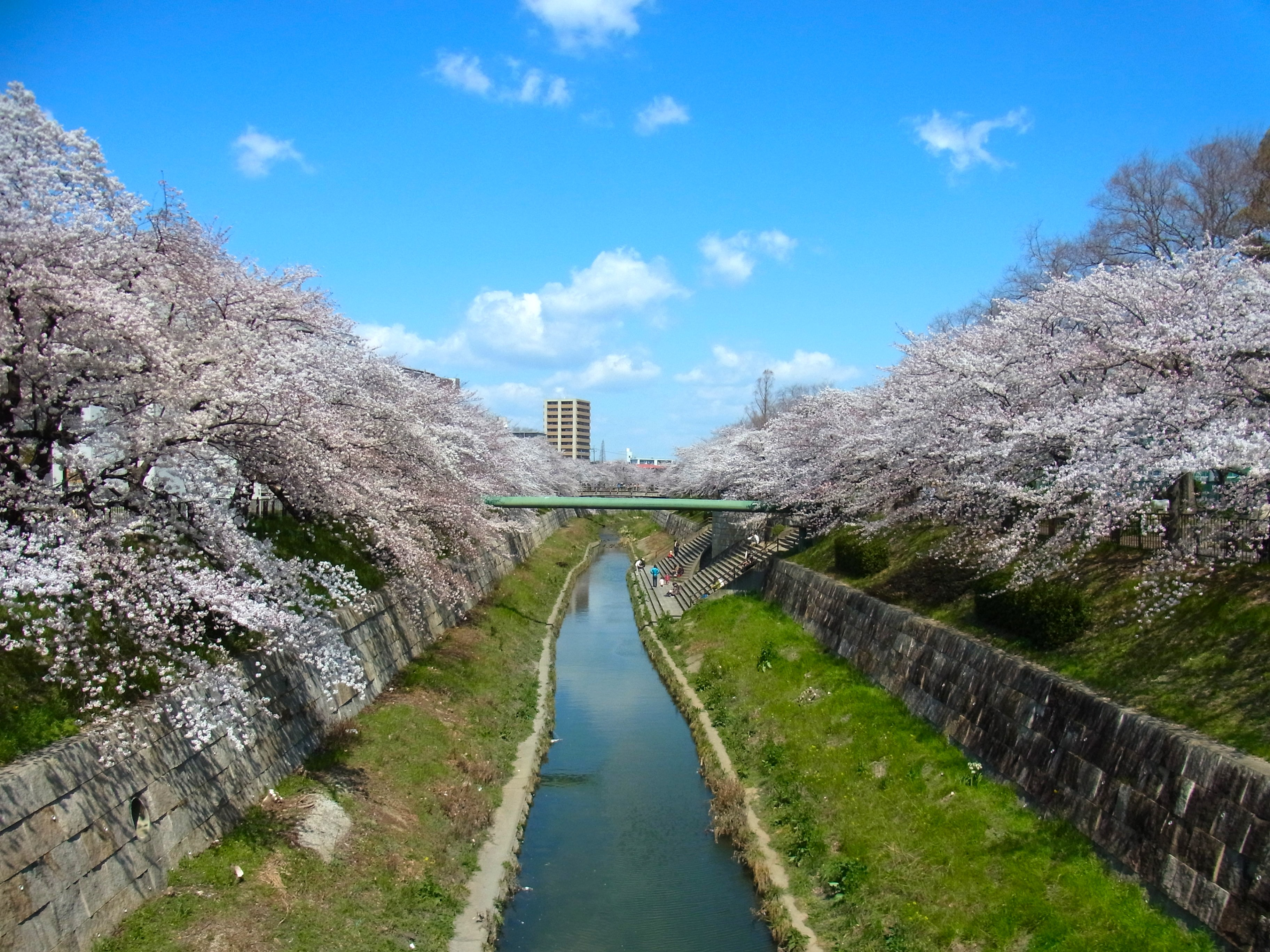 山崎川の桜